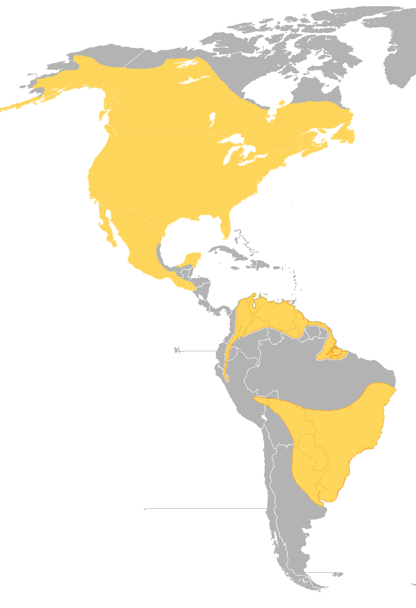 Bubo virginianus distribution map.